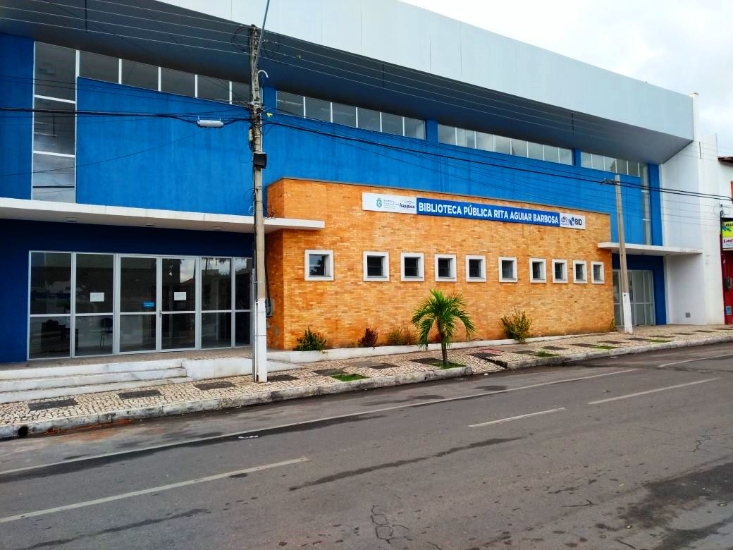 Biblioteca Pública em Itapipoca, Ceará, Brasil.